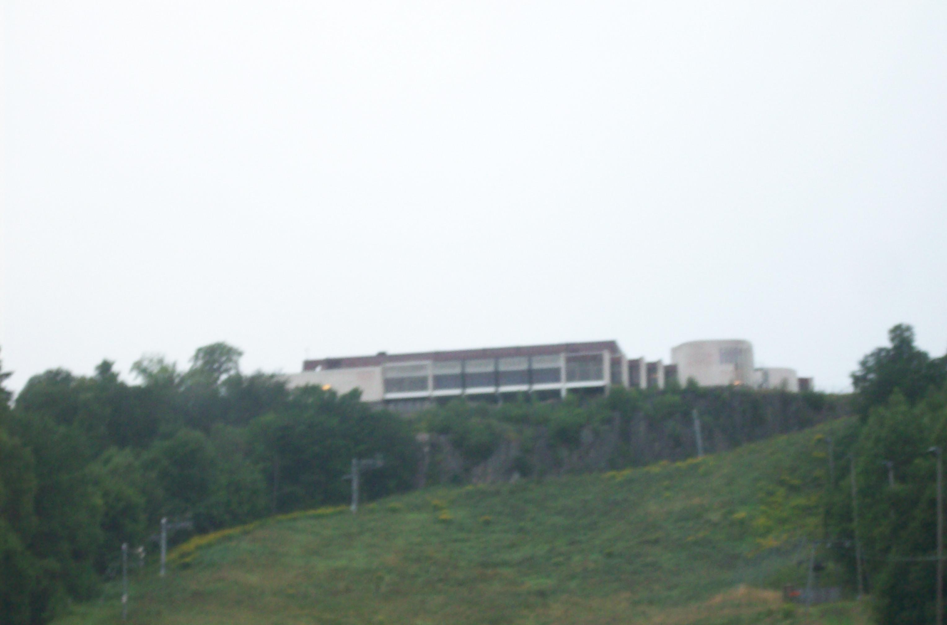 Billingehus på toppen av berget billingen